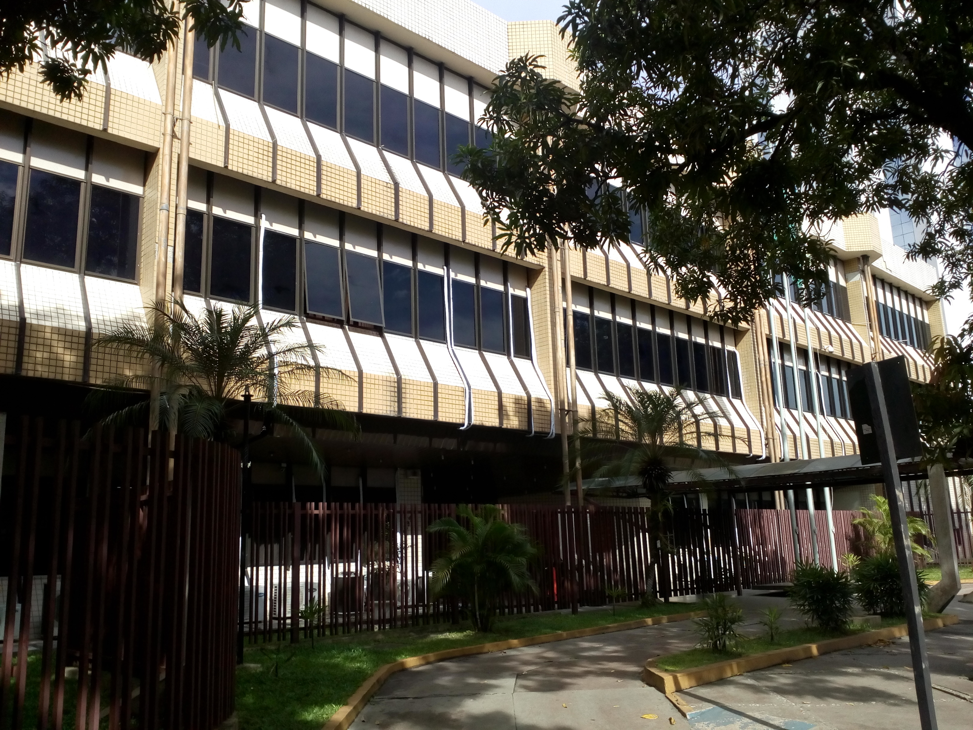 Tribunal de Justiça do Amapá, 2018.